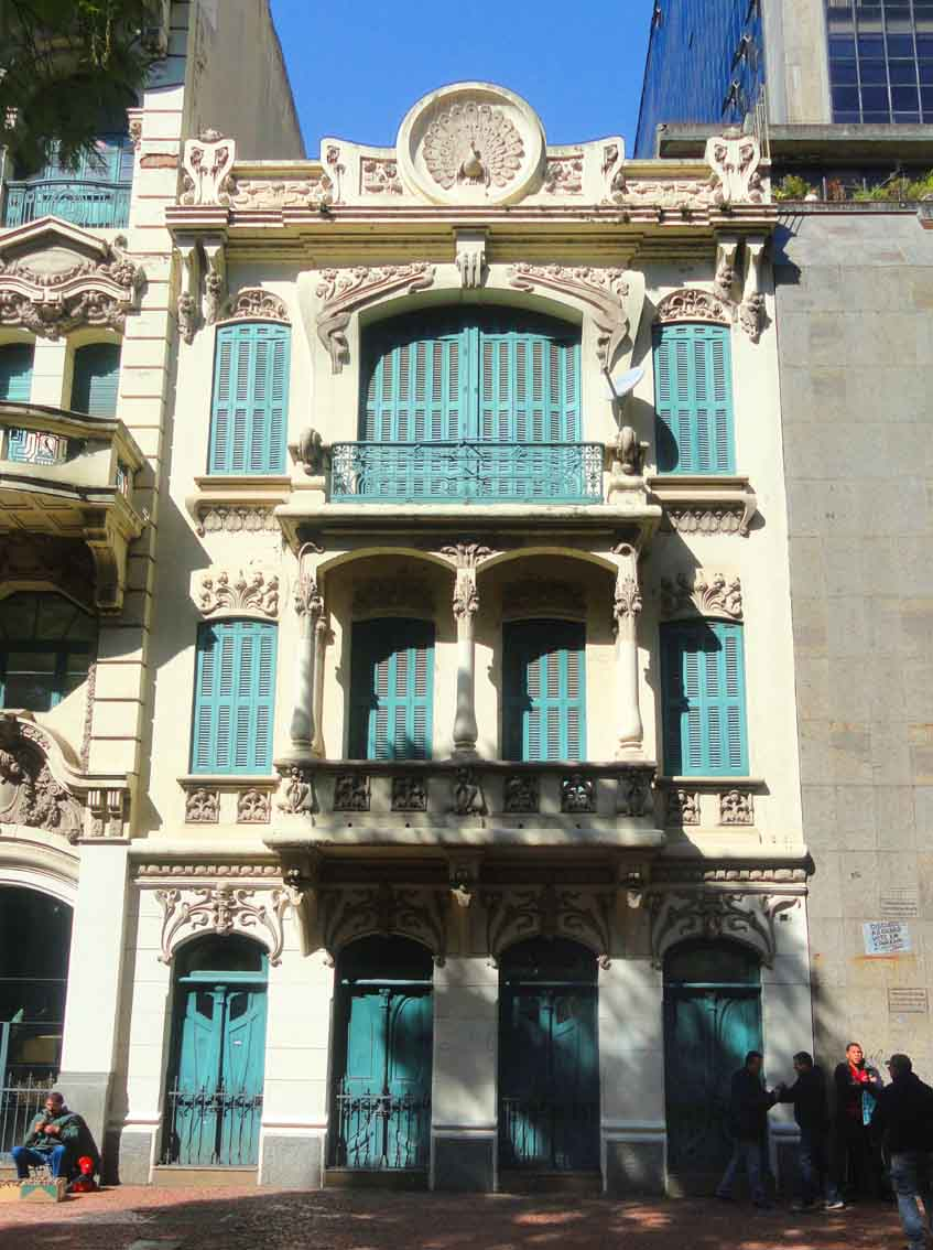 Farmácia Carvalho, Porto Alegre, Brasil